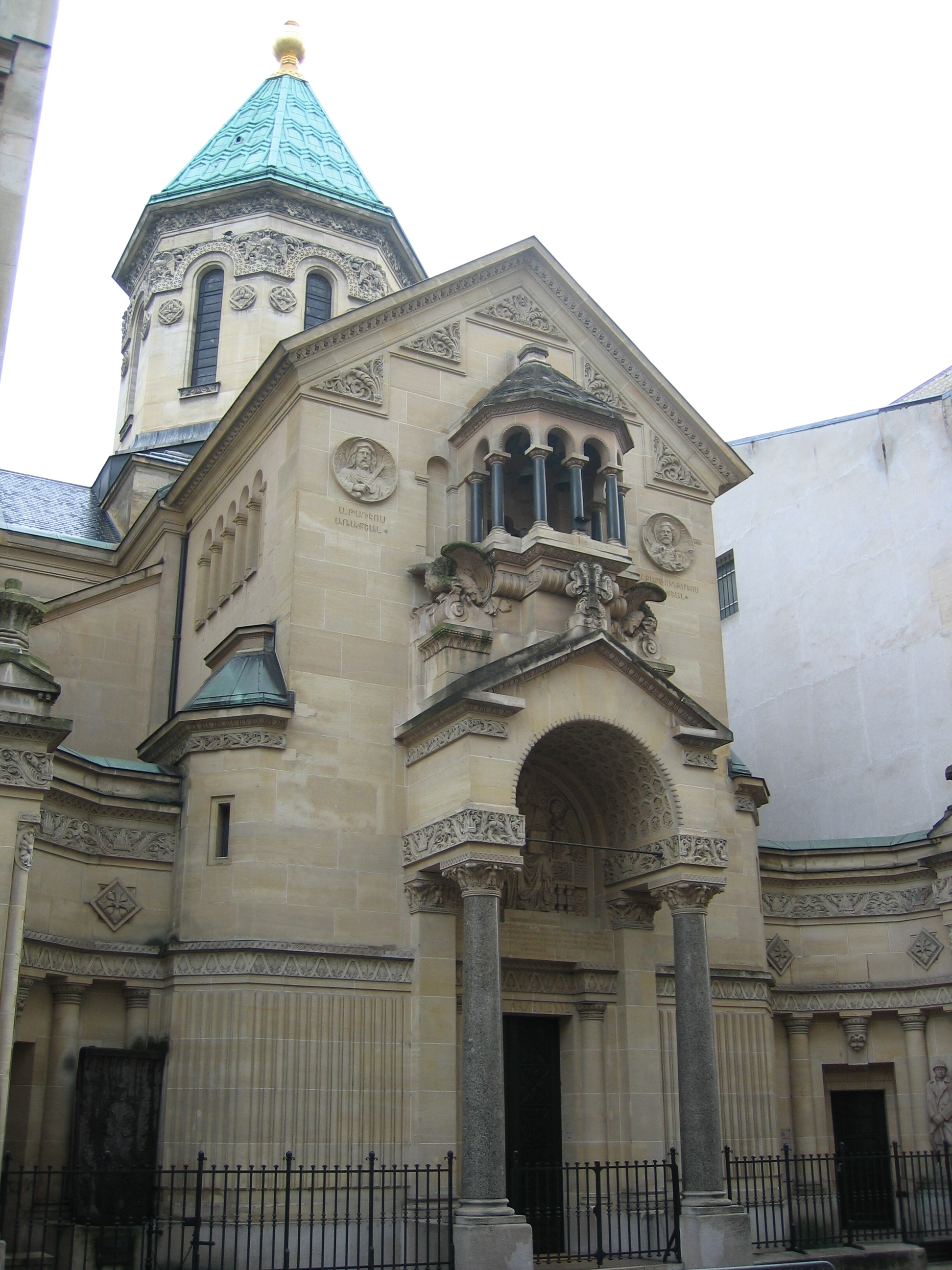 Eglise apostolique arménienne de Paris, délégation pour l'Europe du Catholicossat des Arméniens (archevêché), cathédrale Saint Jean-Baptiste, Paris 8e